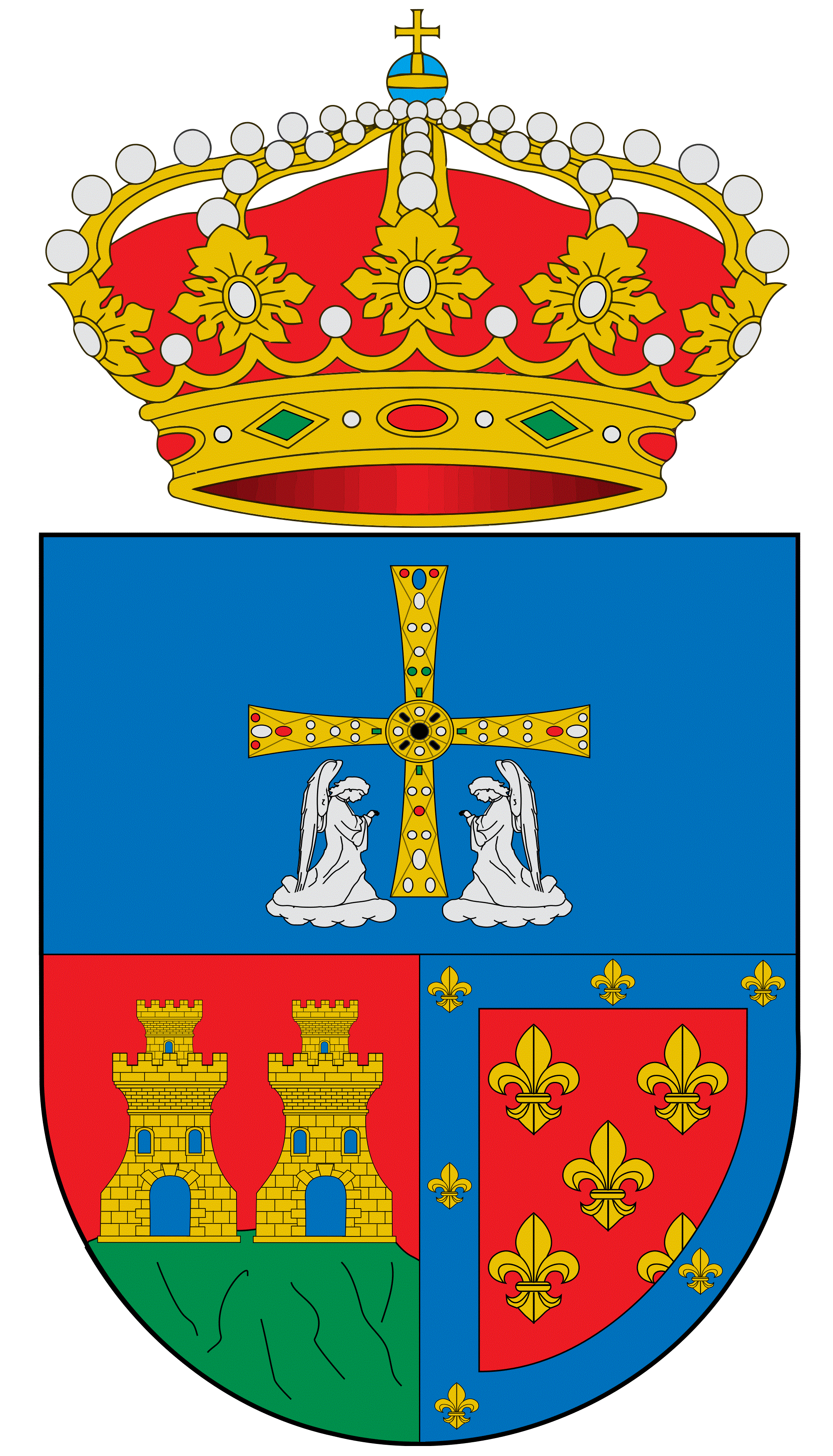 Escudo del concejo asturiano de Proaza